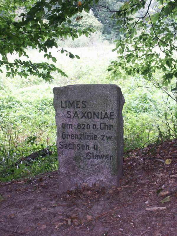 Gedenkstein am Limes Saxoniae. Im Hintergrund Feuchtgebiet im Bereich der (ehemaligen) Mündung des Hornbeker Mühlenbachs in die Delvenau.